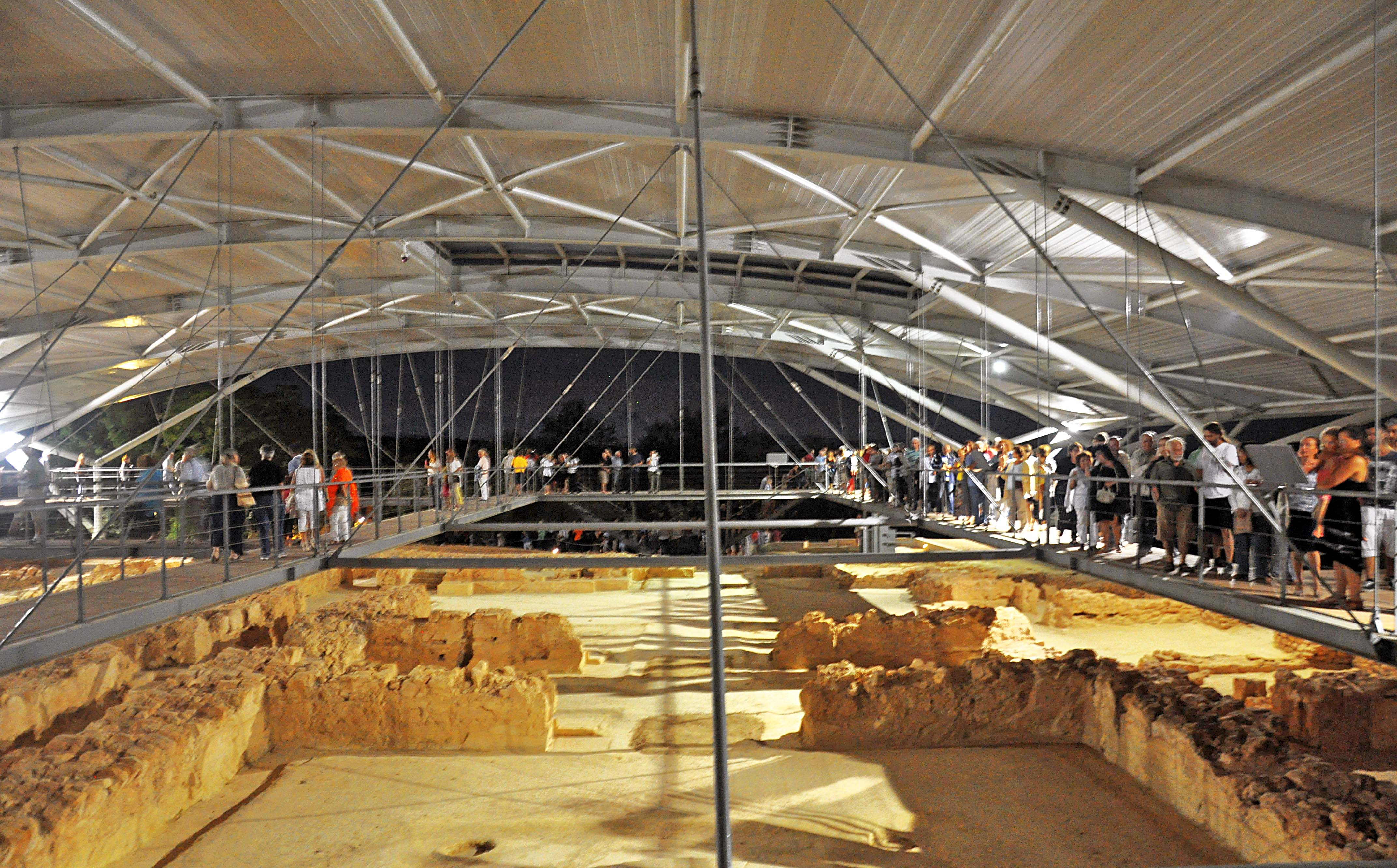 Στέγαστρο με αναρτώμενους διαδρόμους.